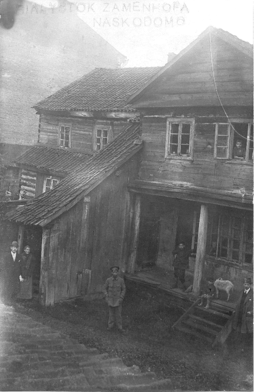 Zamenhof-Geburtshaus, Bialystok um 1900. Foto mit Personen. Bildseitig Stempel, rückseitig Legende in Esperanto